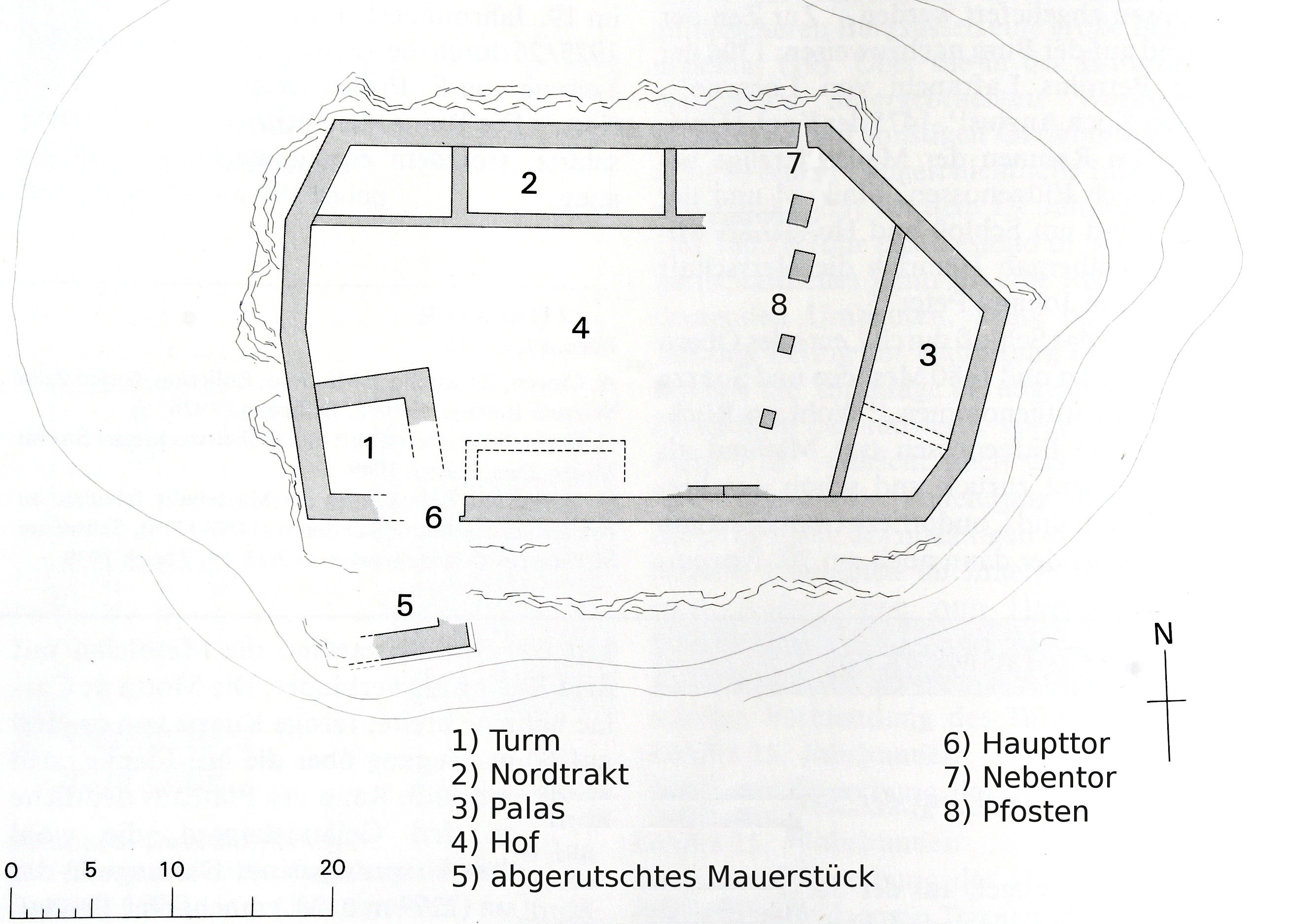 Ruine Norantola: Übersichtsplan Westmauer aussen